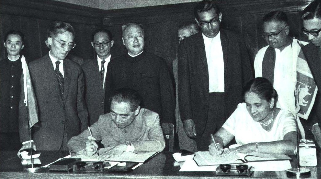 1964-05 1964年2月 周恩来与锡兰总理西丽玛沃·班达拉奈克签署中锡联合声明